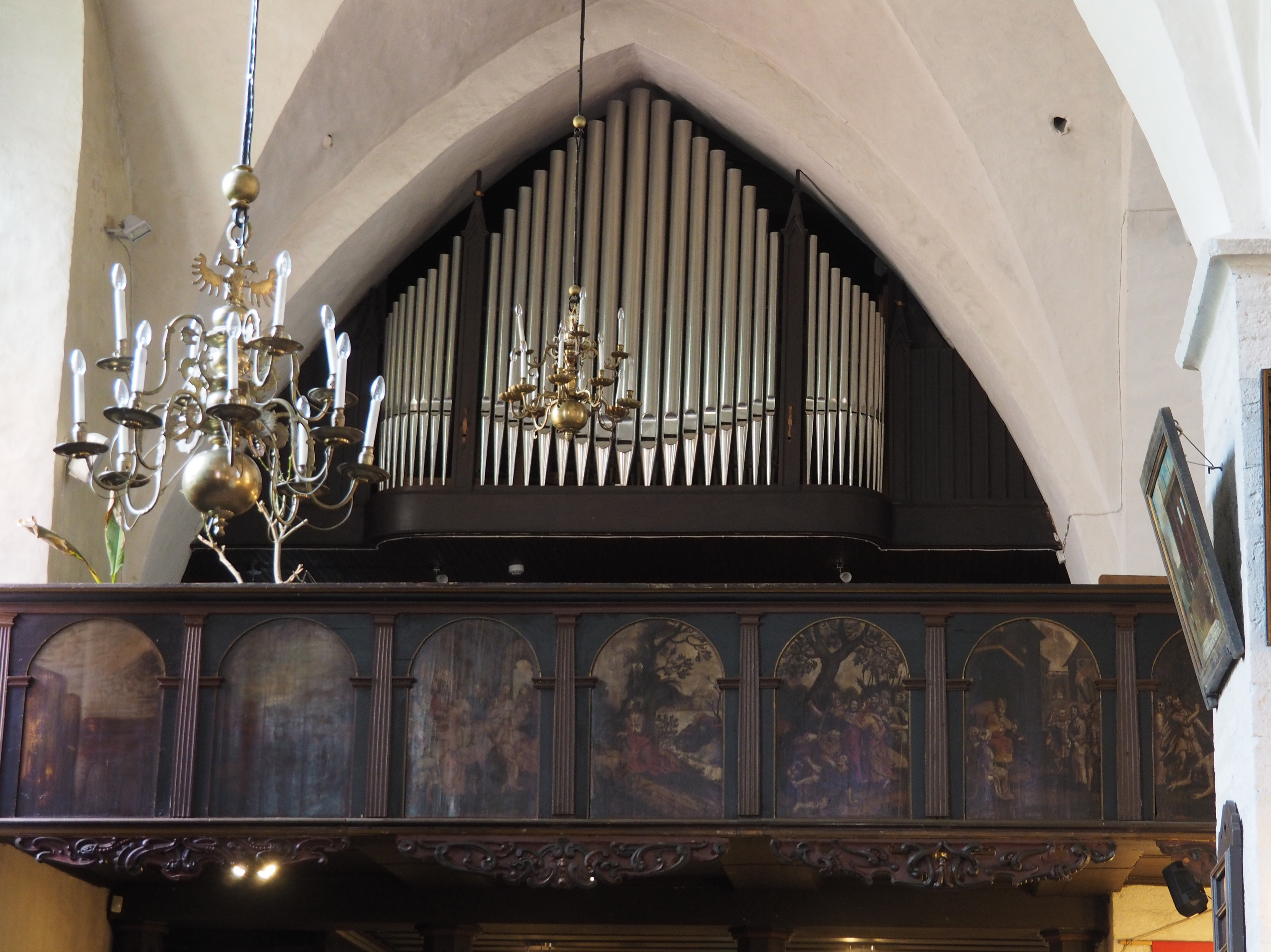 Orgel in der Heiliggeistkirche in Tallin, Estland